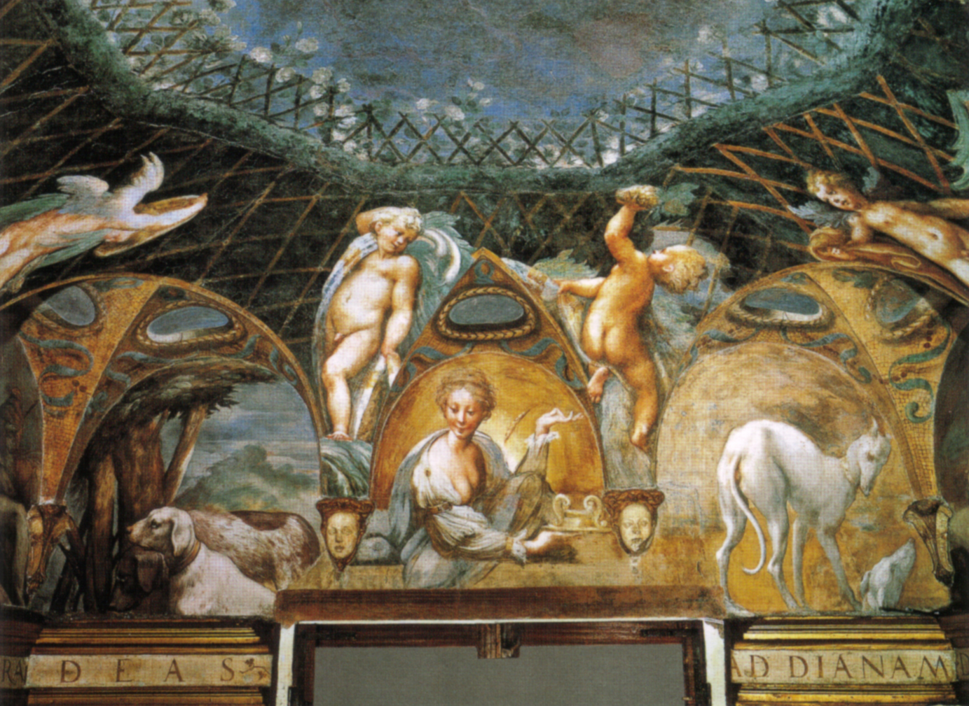 detail